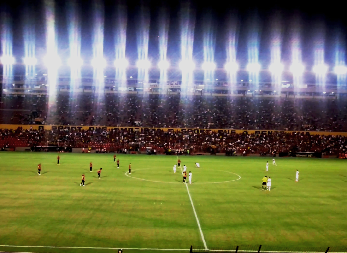 Estádio Ilha do Retiro - Recife, Pernambuco, Brasil.